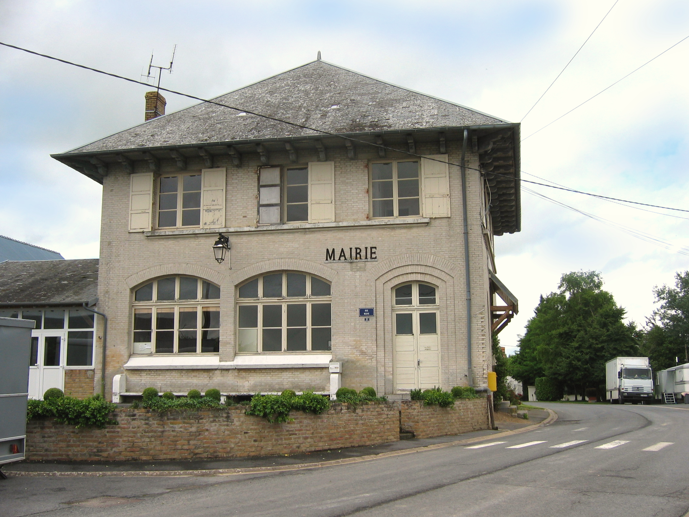 Mairie d'Hannogne-Saint-Remy, Ardennes, France